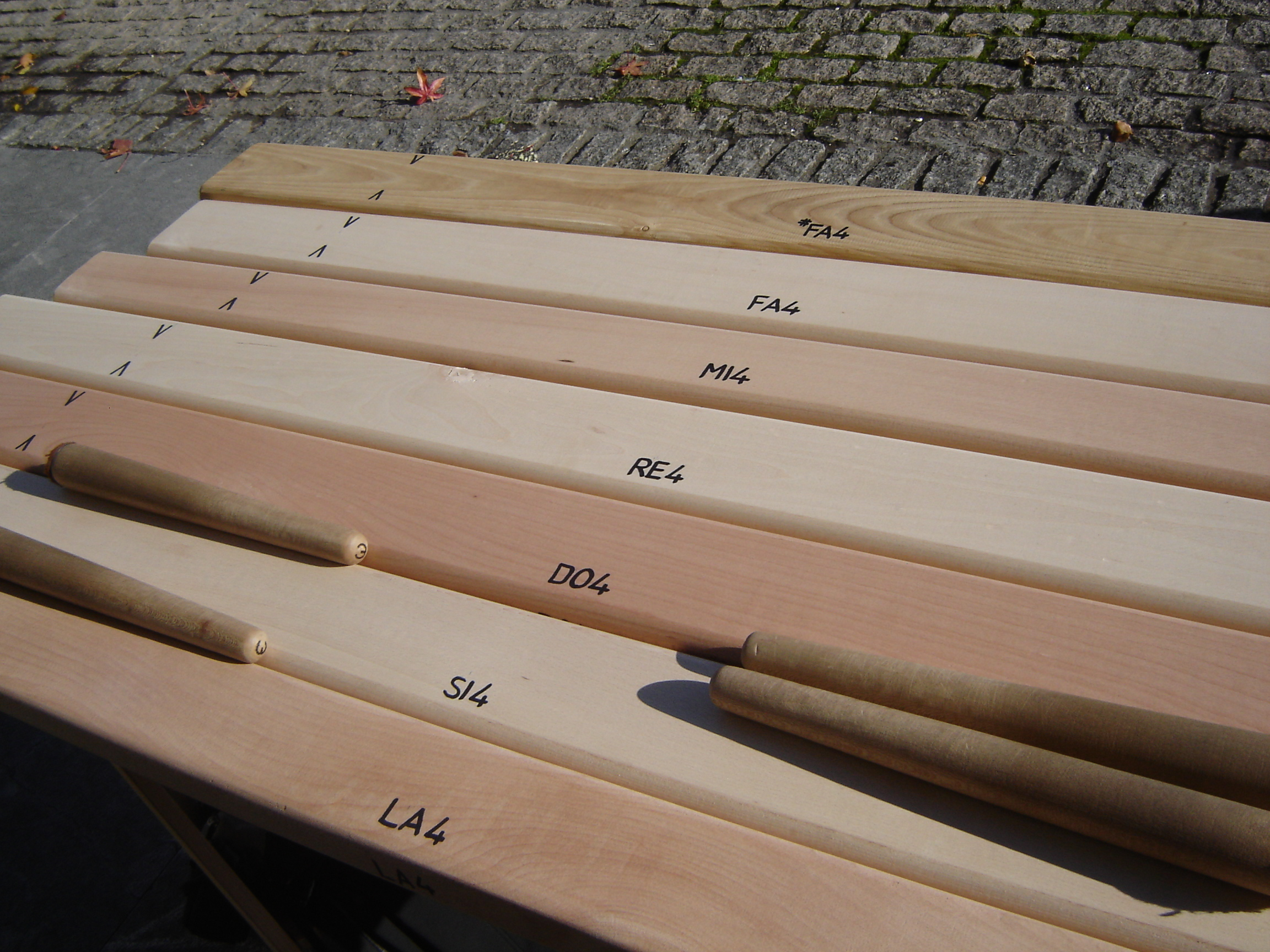 El instrumento, del grupo de los idiófonos.